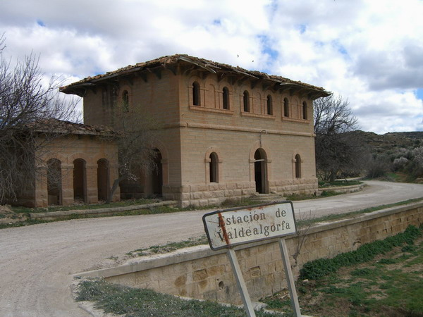 Verlassener Bahnhof von Valdealgorfa im Mudejar-Stil